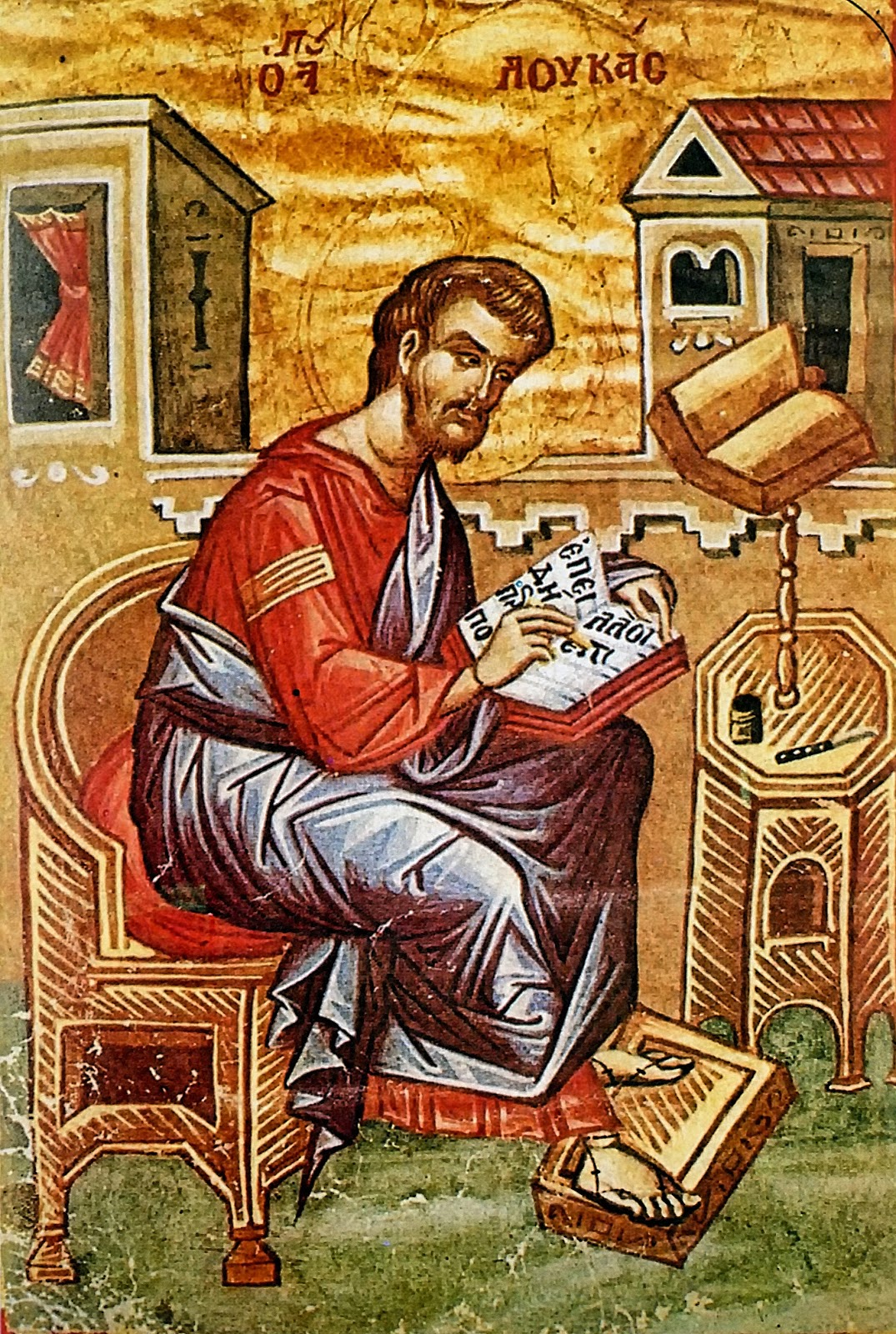 Τετραευάγγελο Ε140 της Μεγίστης Λαύρας. Ευαγγελιστής Λουκάς. 15ος αιώνας